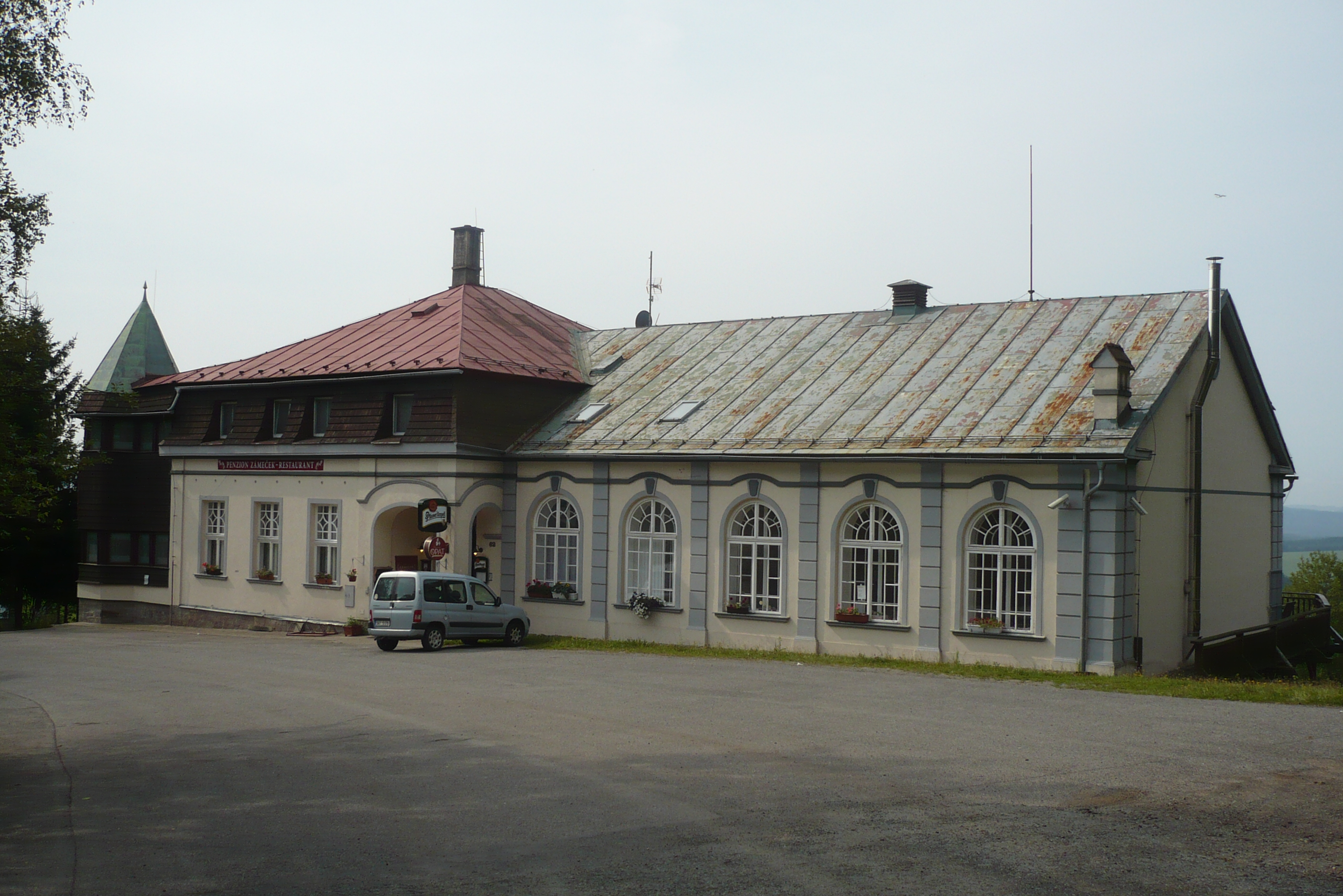 Janovicky. Zajazd Franza Birkego z 1916 r.